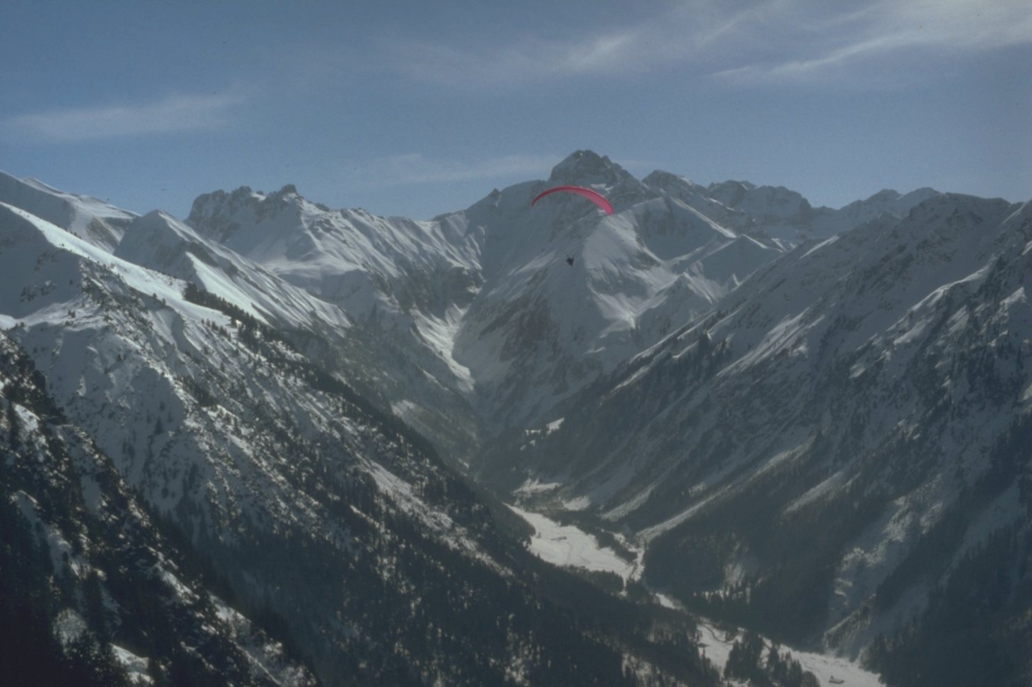 Trettachtal vom Vorderen Riefenkopf